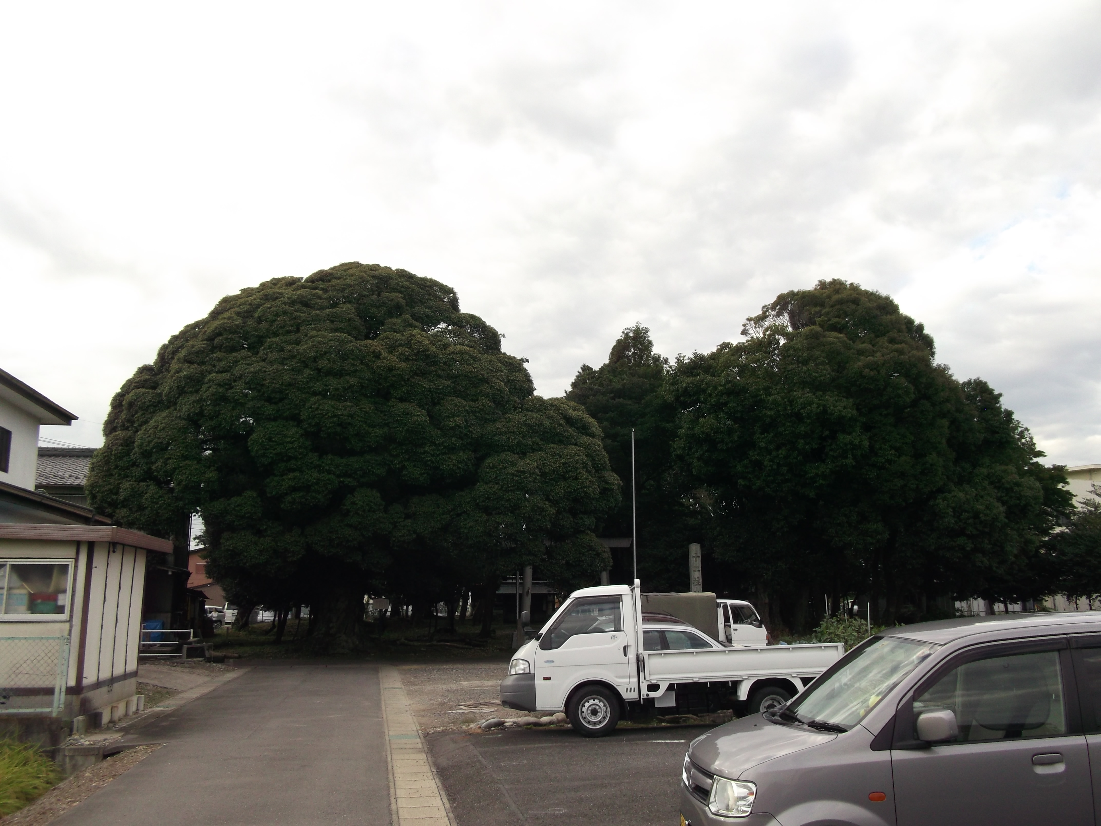 愛知県小牧市の多気十二柱神社を東側公道より撮影